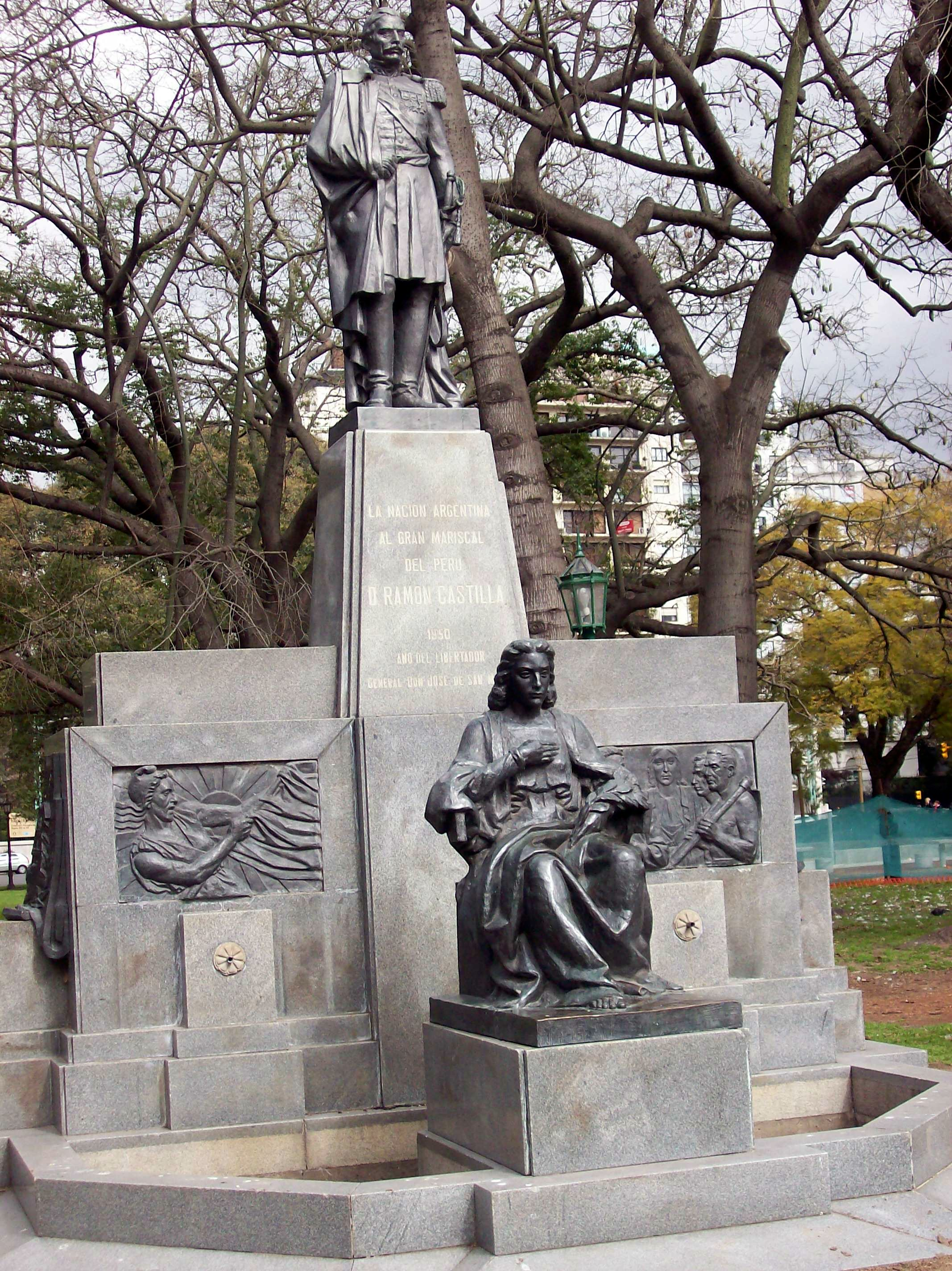 Monumento a Ramon Castilla realizado por Tono Sino, en 1953, en Plaza República de Chile, Parque Tres de Febrero, Buenos Aires.